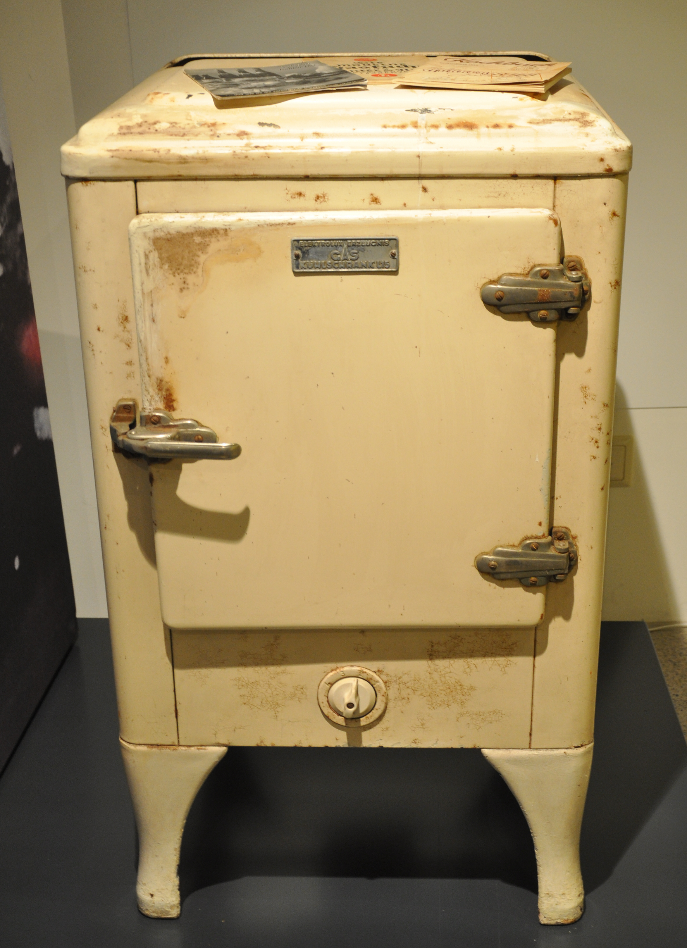 Gaskühlschrank Elektrolux L15, 1940er Jahre Ausstellung StadtGasLicht 1862–2012 im Museum Humpis-Quartier Ravensburg